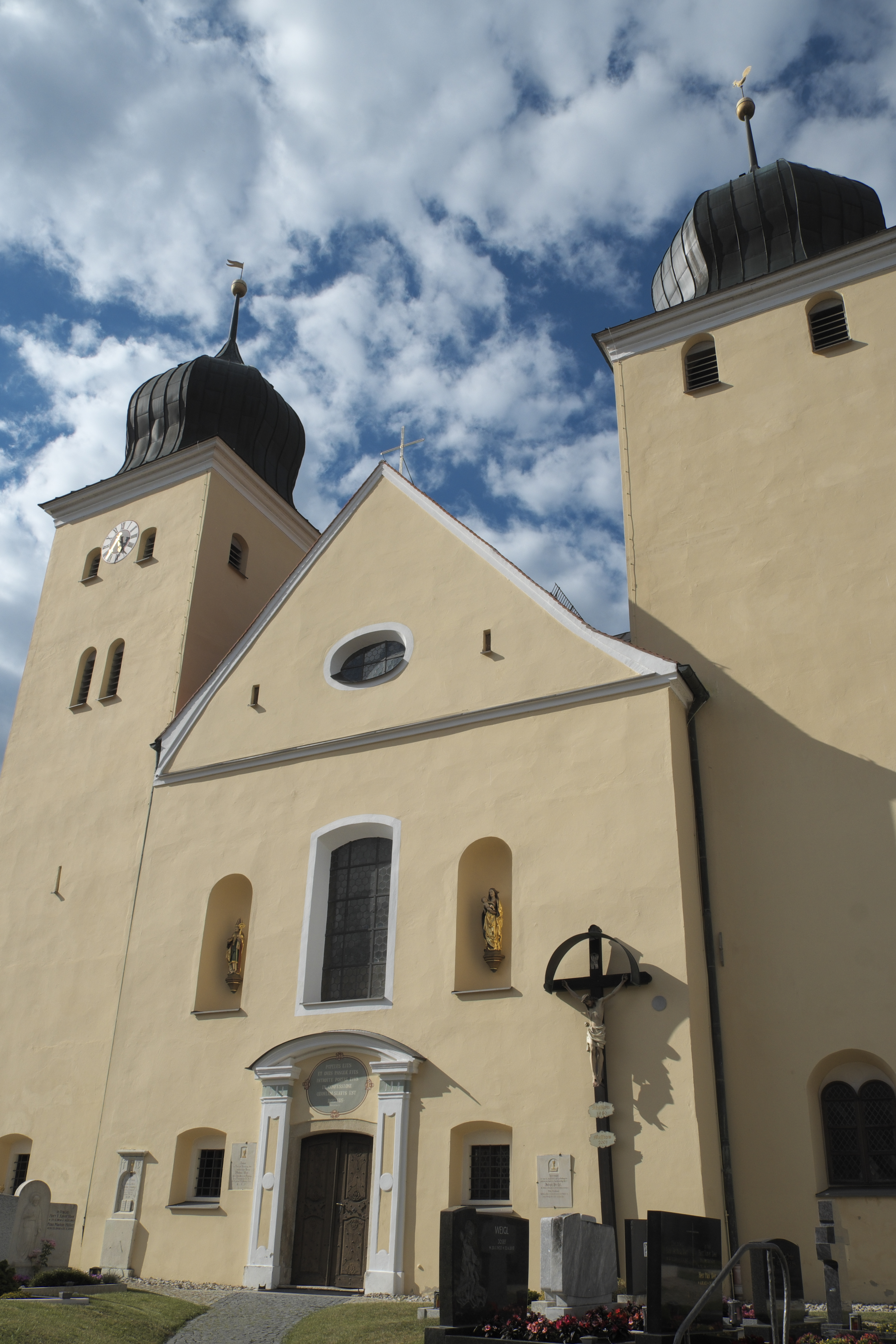 Katholische Pfarrkirche St. Vitus in Kottingwörth (Beilngries) im oberbayerischen Landkreis Eichstätt (Bayern/Deutschland), Doppelturmfassade